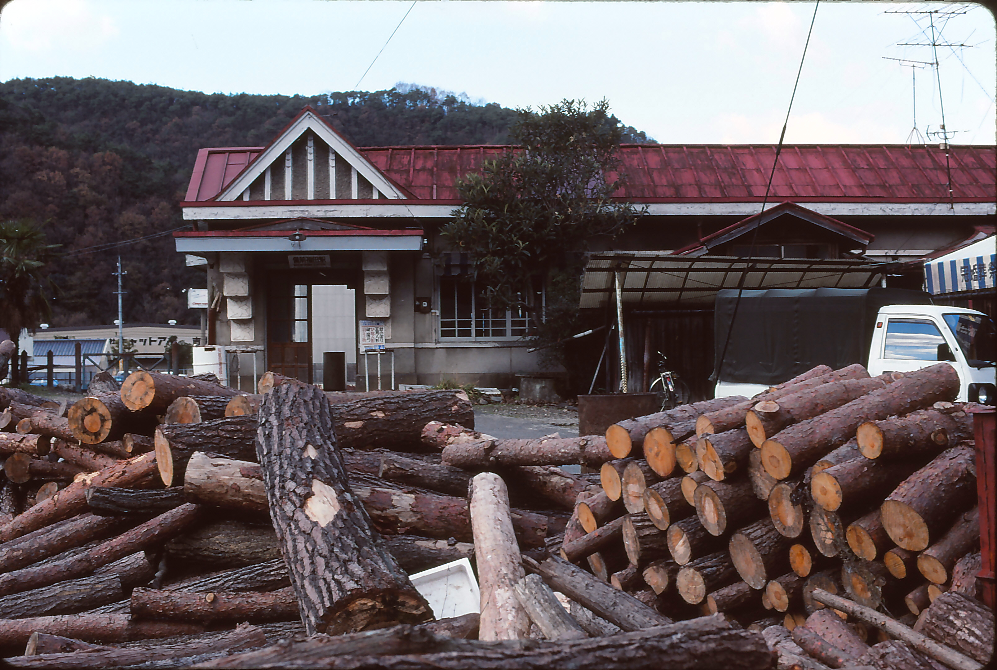 同和鉱業片上鉄道 備前福田駅